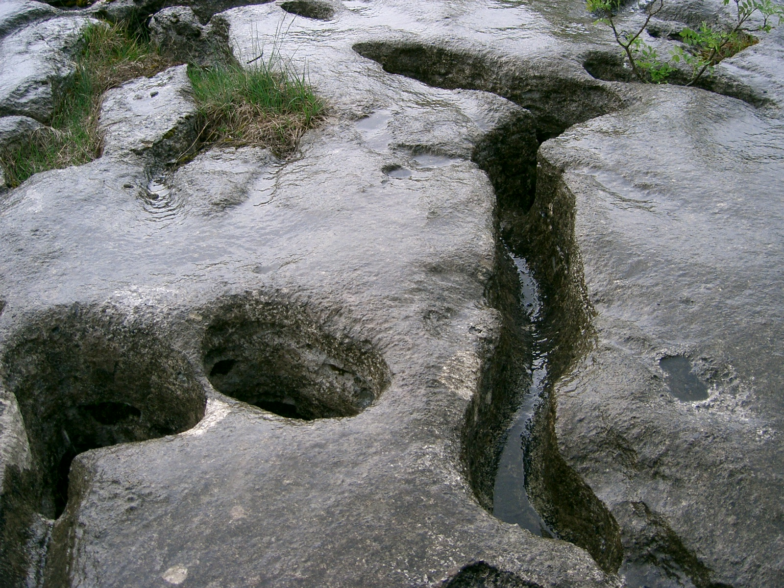 Lapiaz - curiosité géologique karstique - érosion - Jura.